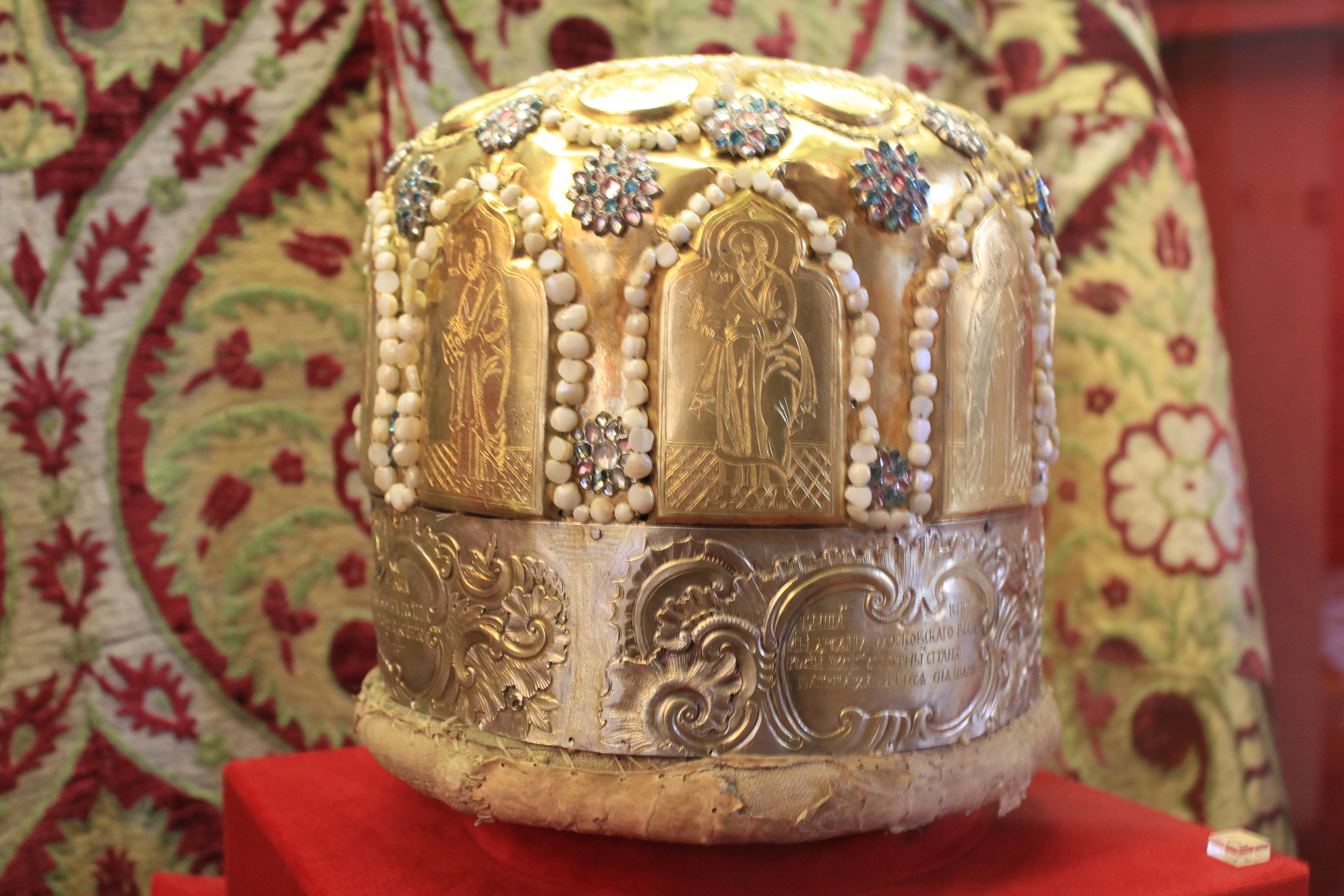 Objet conservé au musée national d'Histoire de Moscou